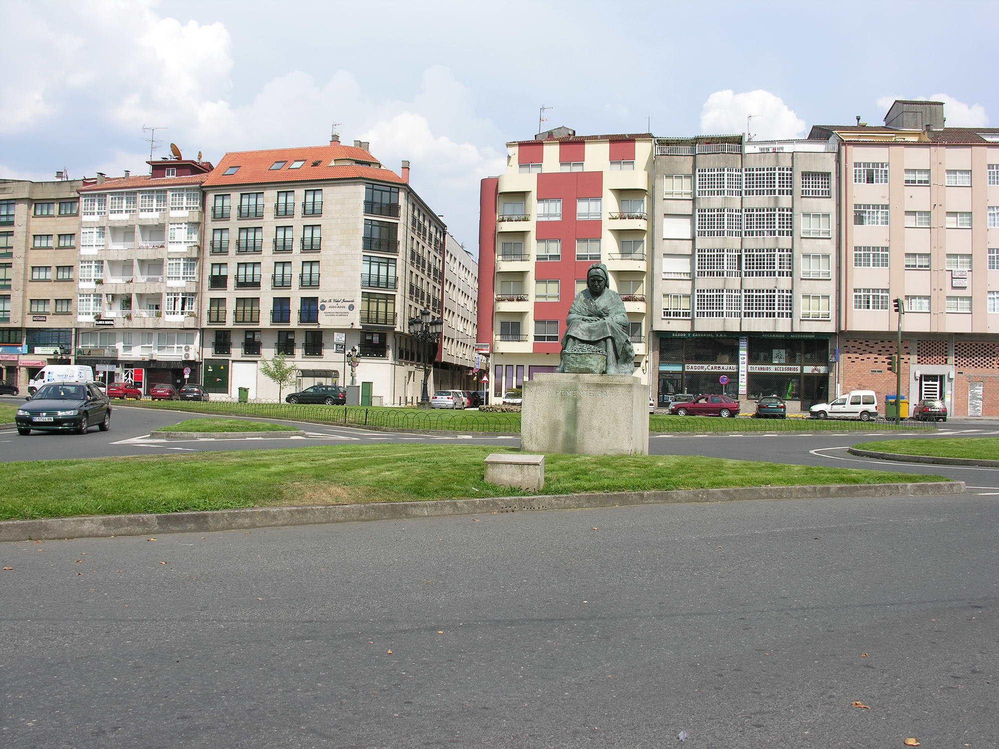 Padrón, Galicia Publish by= Luis Miguel Bugallo Sánchez.